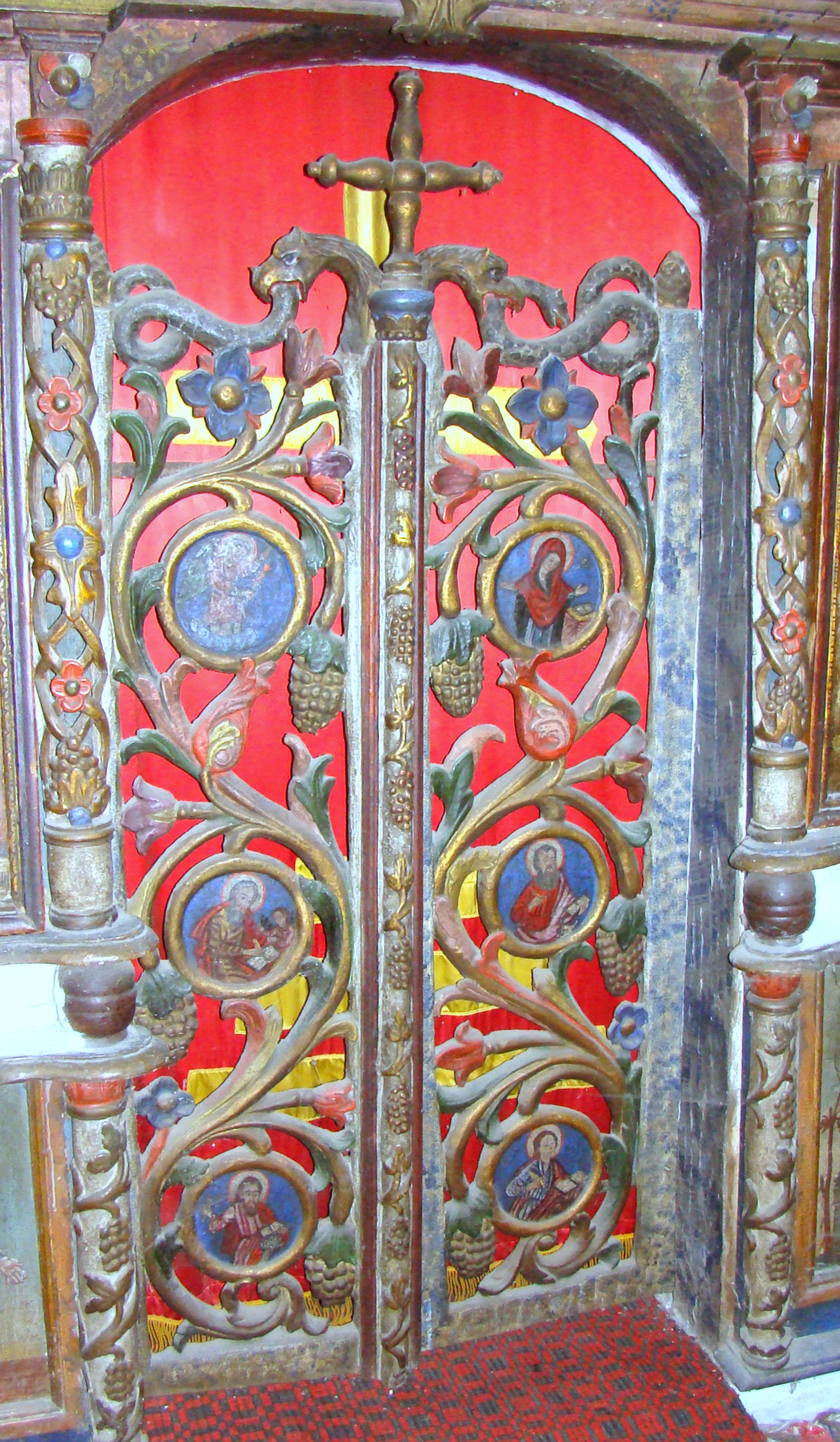 Biserica de lemn din Suplai-interioare